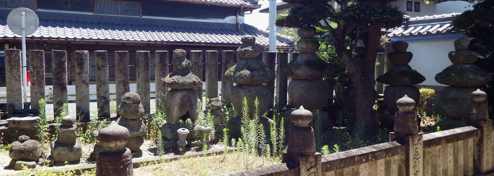 本山寺の五輪塔群